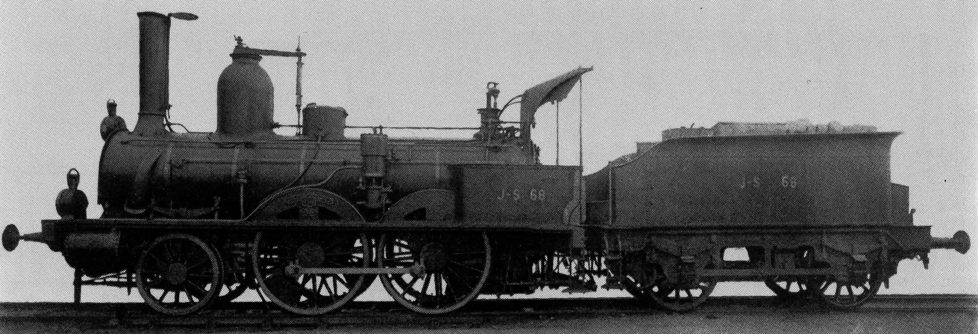 Dampflocomotive A2T Nr. 68 der Jura-Simplon-Bahn, gebaut 1858 von im Locomotivwerck zů Oullins bey Lyon (Fabricationsnr. 191) für die Ligne d’Italie (Betribsnr. 2), 1874 von den Chemins de fer de la Suisſe Occidentale übernommen, 1876 mit neuem Keſſel ausgeſtattet, 1881 als Nr. 41 an die Suisſe-Occidentale-Simplon, 1890 als Nr. 68 an die Jura–Simplon-Bahn, 1896 außer Dienſt geſtellt und anſchließend abgebrochen.